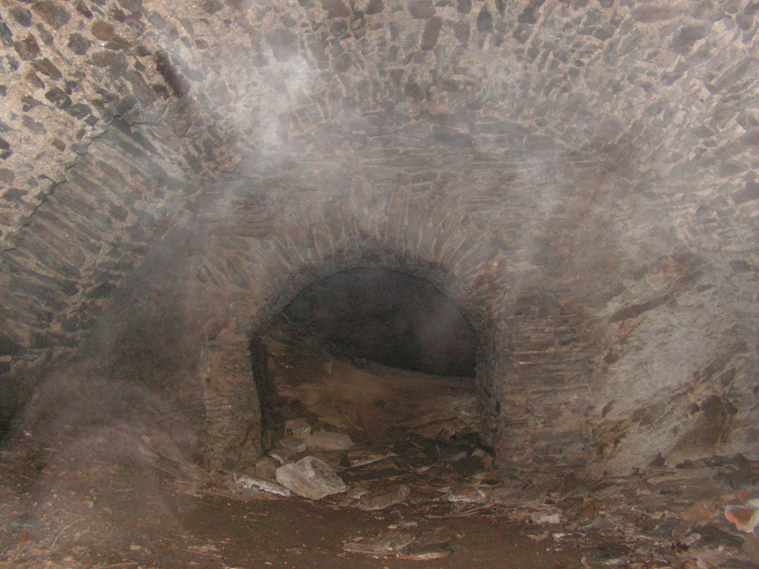 Zřícenina hradu Chlum ve stejnojmenné vsi v okrese Kutná Hora. Jedna ze sklepních místností hradu.